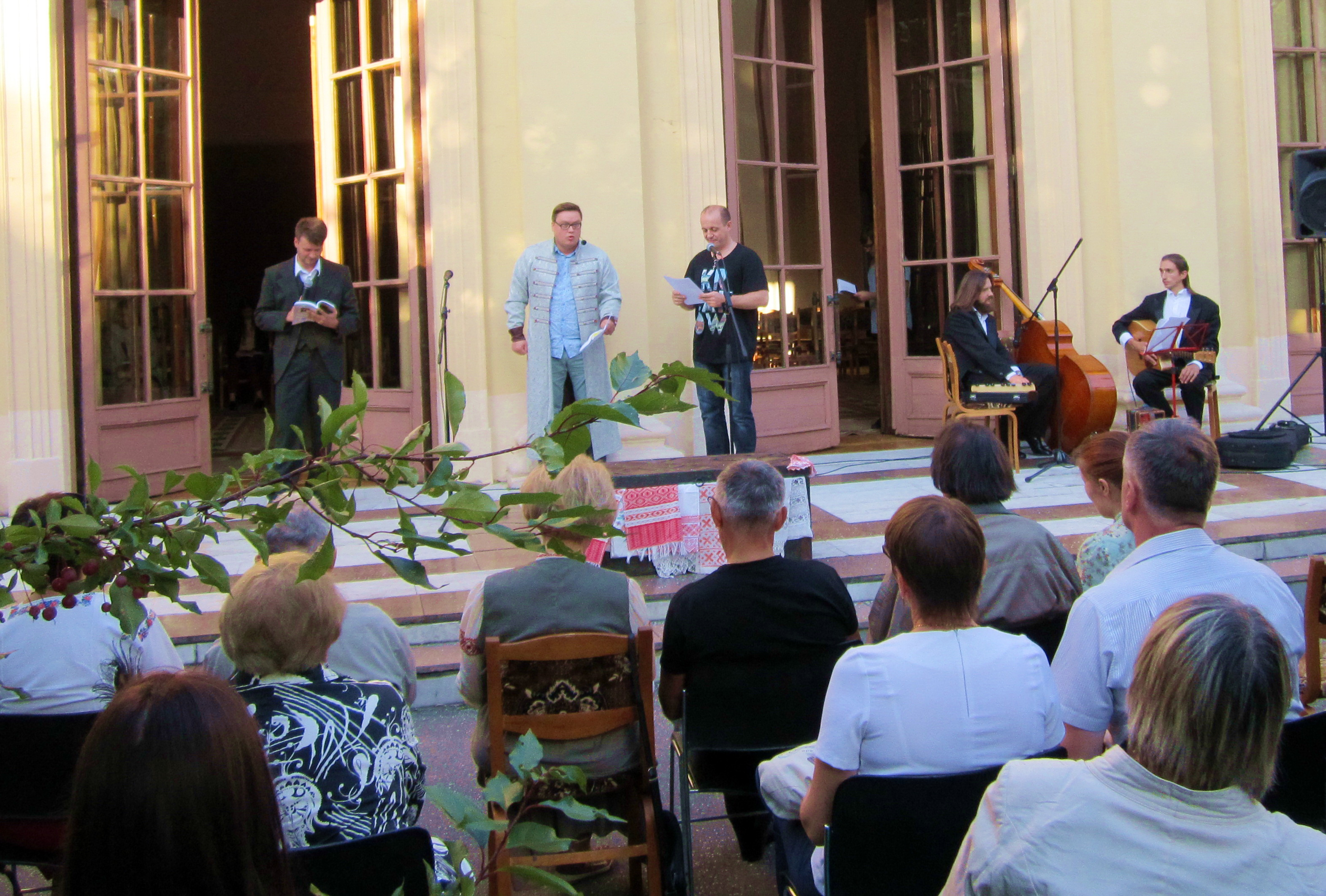 Narodowe Czytanie w Mińsku. Pierwsze wspólne polsko-białoruskie czytanie „Wesela” Stanisława Wyspiańskiego pod hasłem „Literatura ponad granicami”. Organizator wydarzenia - Instytut Polski w Mińsku. Swoje role czytają: aktorz Narodowego Akademickiego teatru imienia Janki Kupały Raman Padaliaka, dziennikarz radia „Swaboda" Janusz Kalinowski, dziennikarz i pisarz Aleh Gruszecki